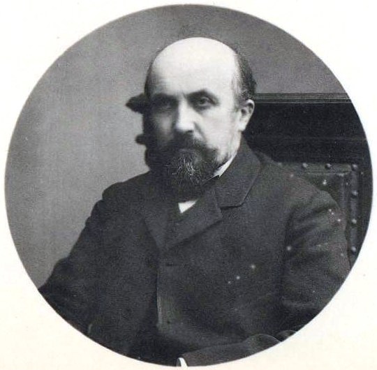 Рейн, Фёдор Александрович